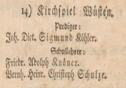 Fürstlich Lippisches Adress-Verzeichnis (1803) Kapitel VII: Geistliche und Schulbediente in den Städten und auf dem Lande Abschnitt XXIV: Kirchspiel Wüsten Prediger und Schullehrer